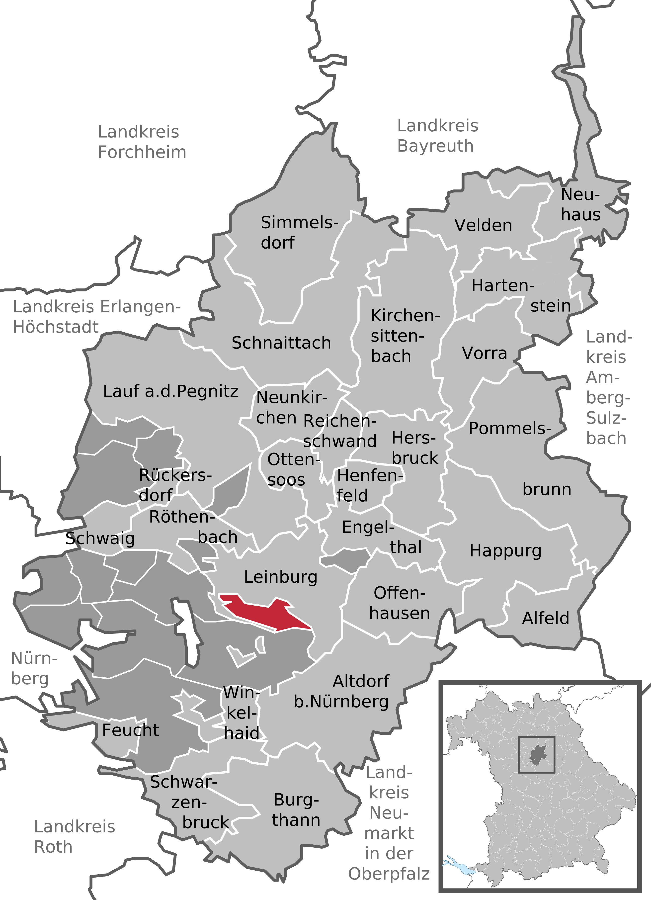 Positionskarte des Gemeindefreien Gebietes Leinburg